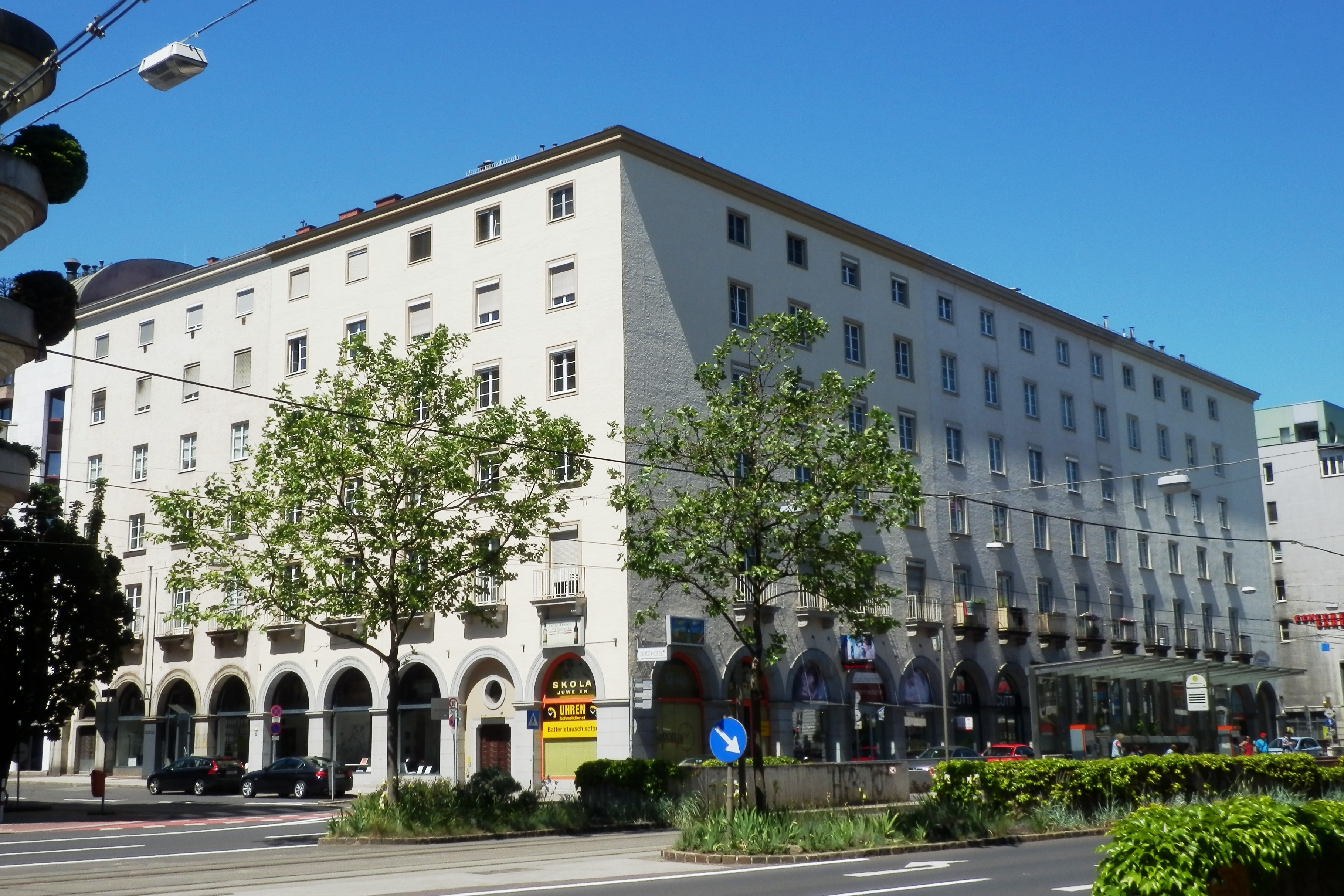 Hauptstraße / Fiedlerstraße - Linz-Urfahr